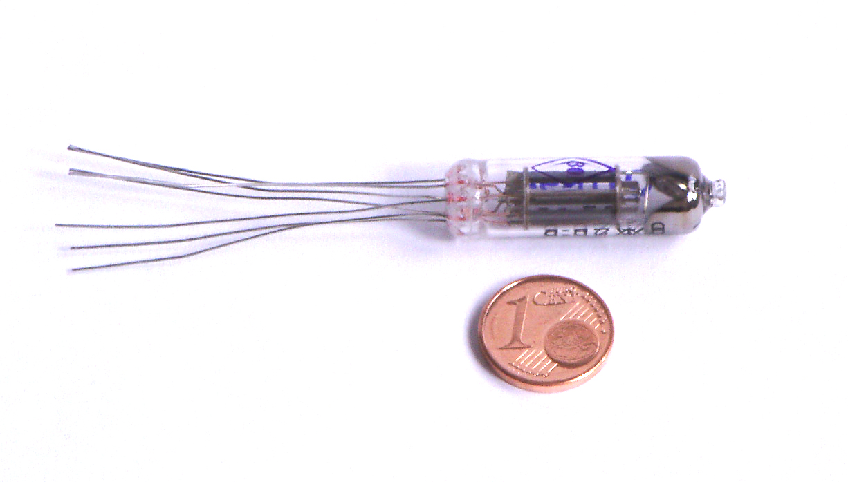 Eine russische Subminiaturröhre (Pentode) mit Größenvergleich 1 Eurocentmünze